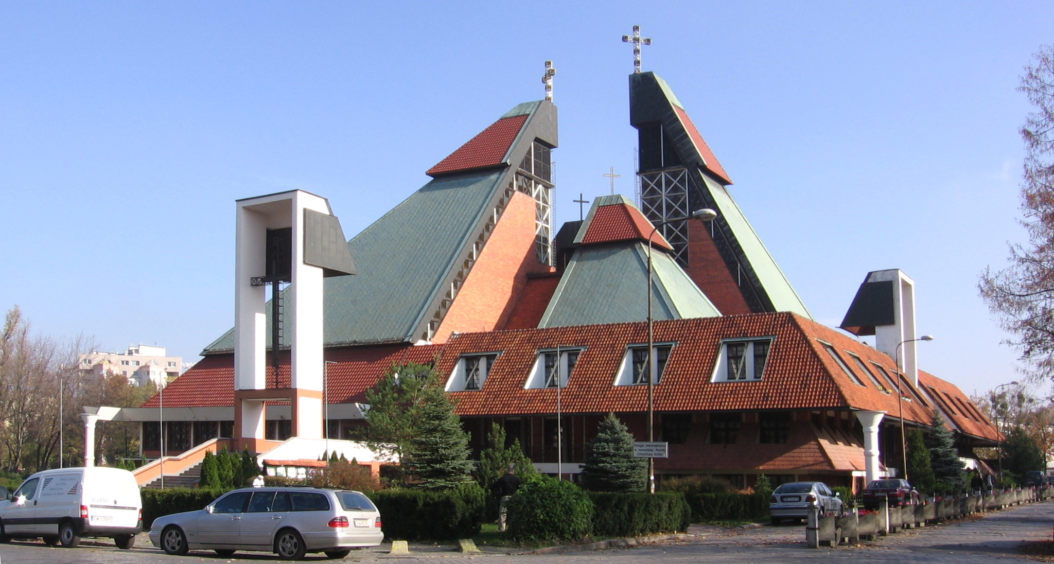 kościół Chrystusa Króla we Wrocławiu, widok od strony skrzyżowania ul. Młodych Techników (z lewej) i Salezjańskiej (z prawej)